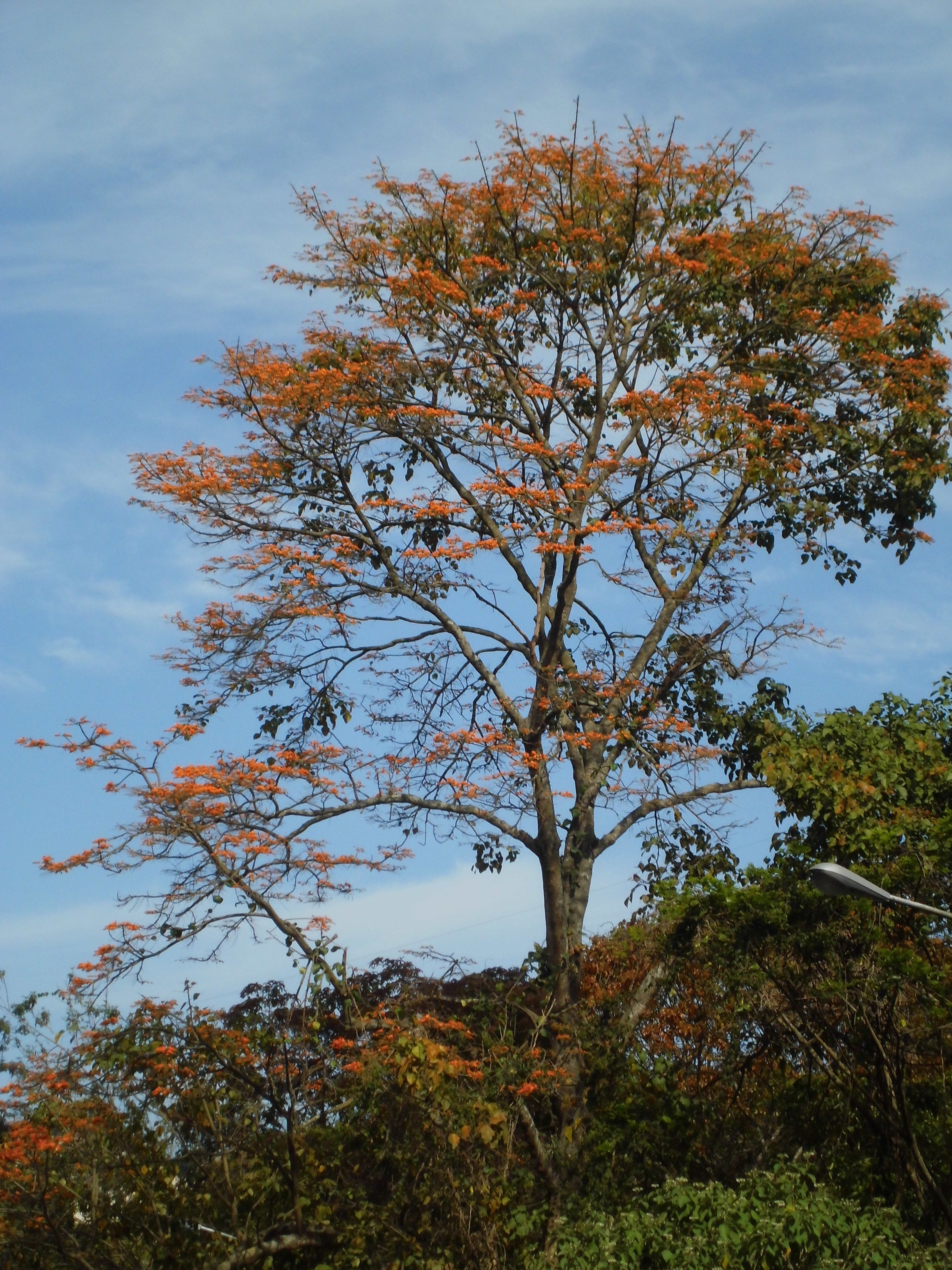 Erythrina poeppigiana (Walp.) O.F.Cook., localizado a La Boyera en el municipio El Hatillo, estado Miranda - Venezuela